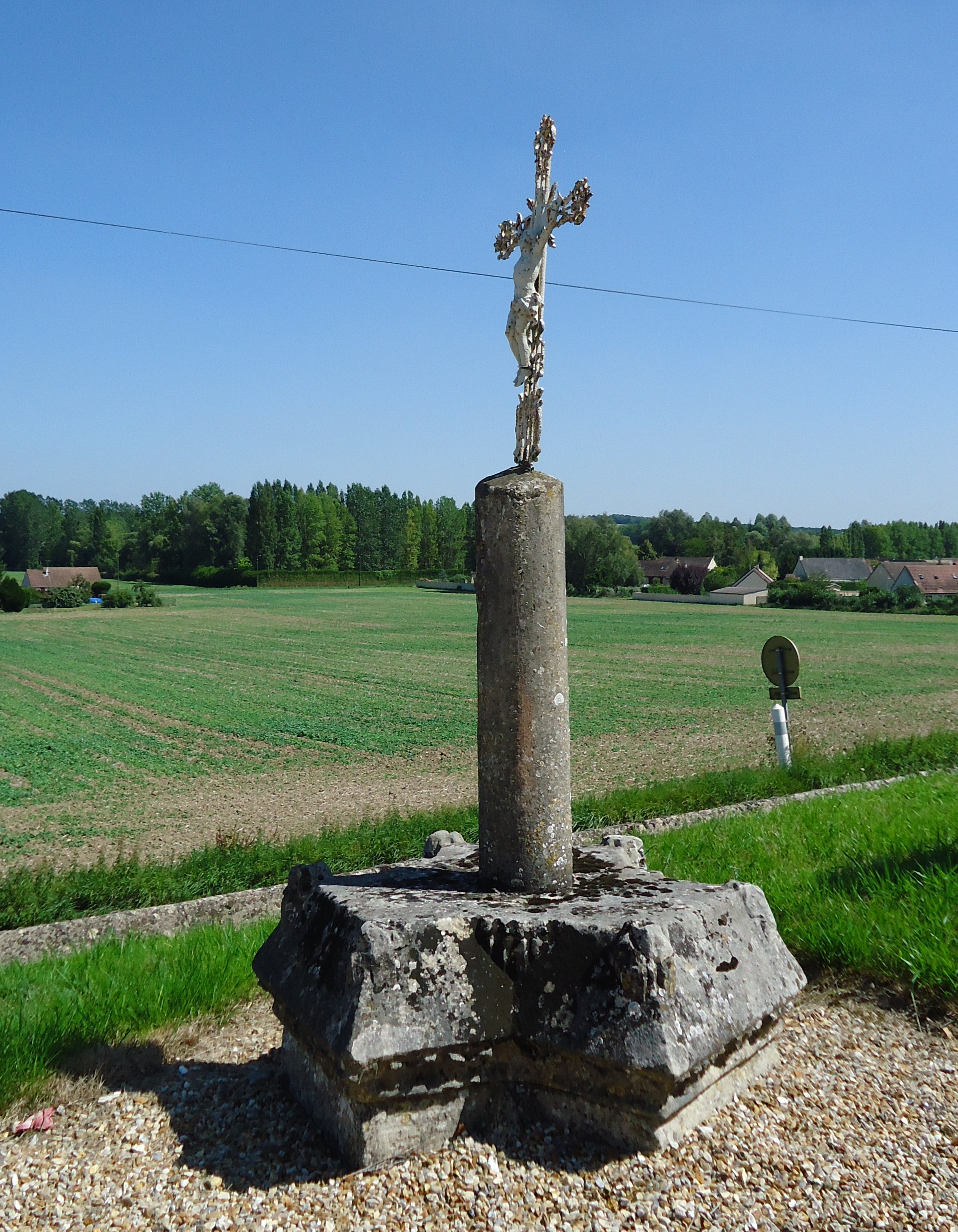 Gadencourt - Calvaire du Cimetière XVe (ISMH)